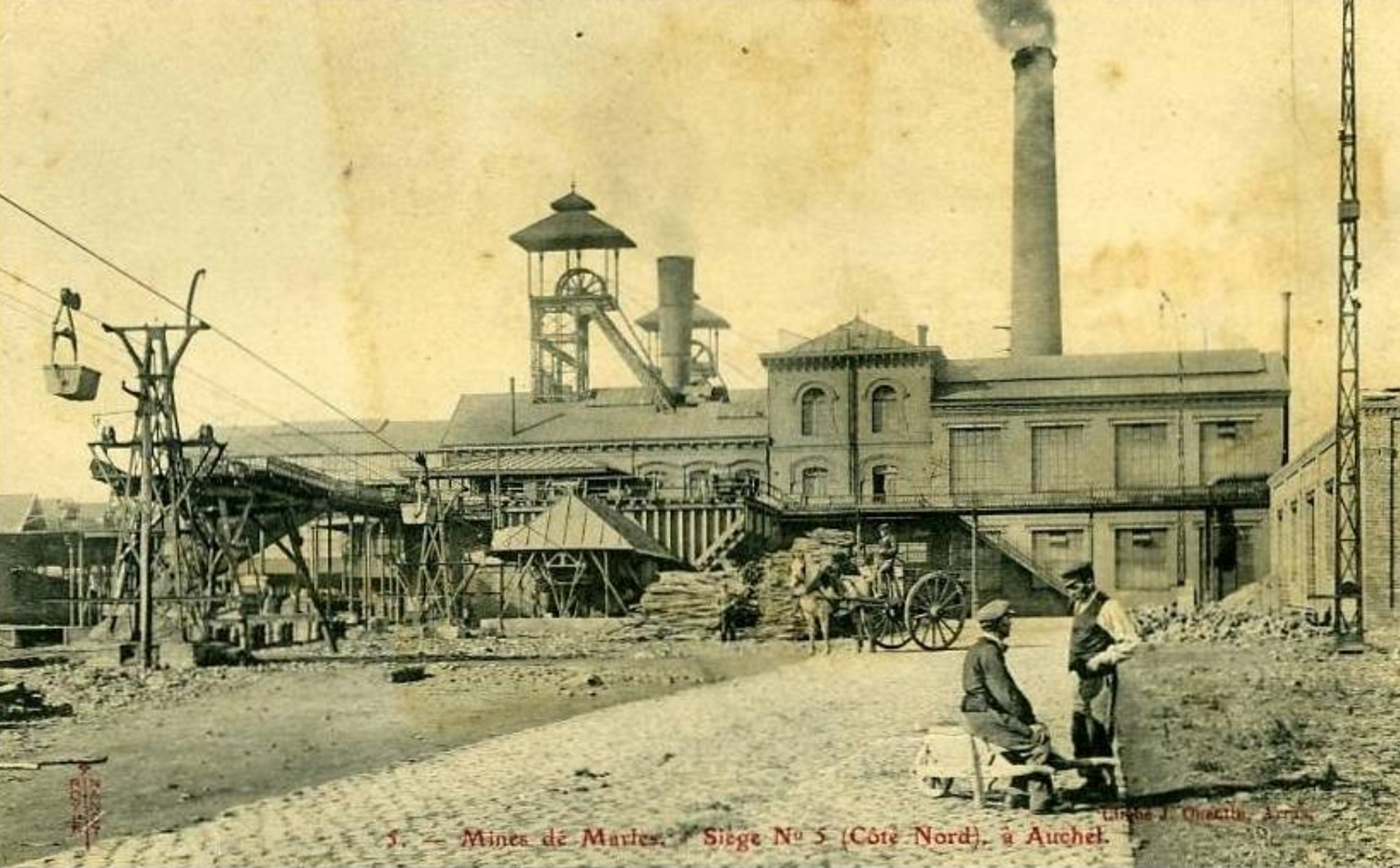 La Fosse n° 5 - 5 bis - 5 ter de la Compagnie des mines de Marles était un charbonnage constitué de trois puits situé à Auchel, Pas-de-Calais, Nord-Pas-de-Calais, France.